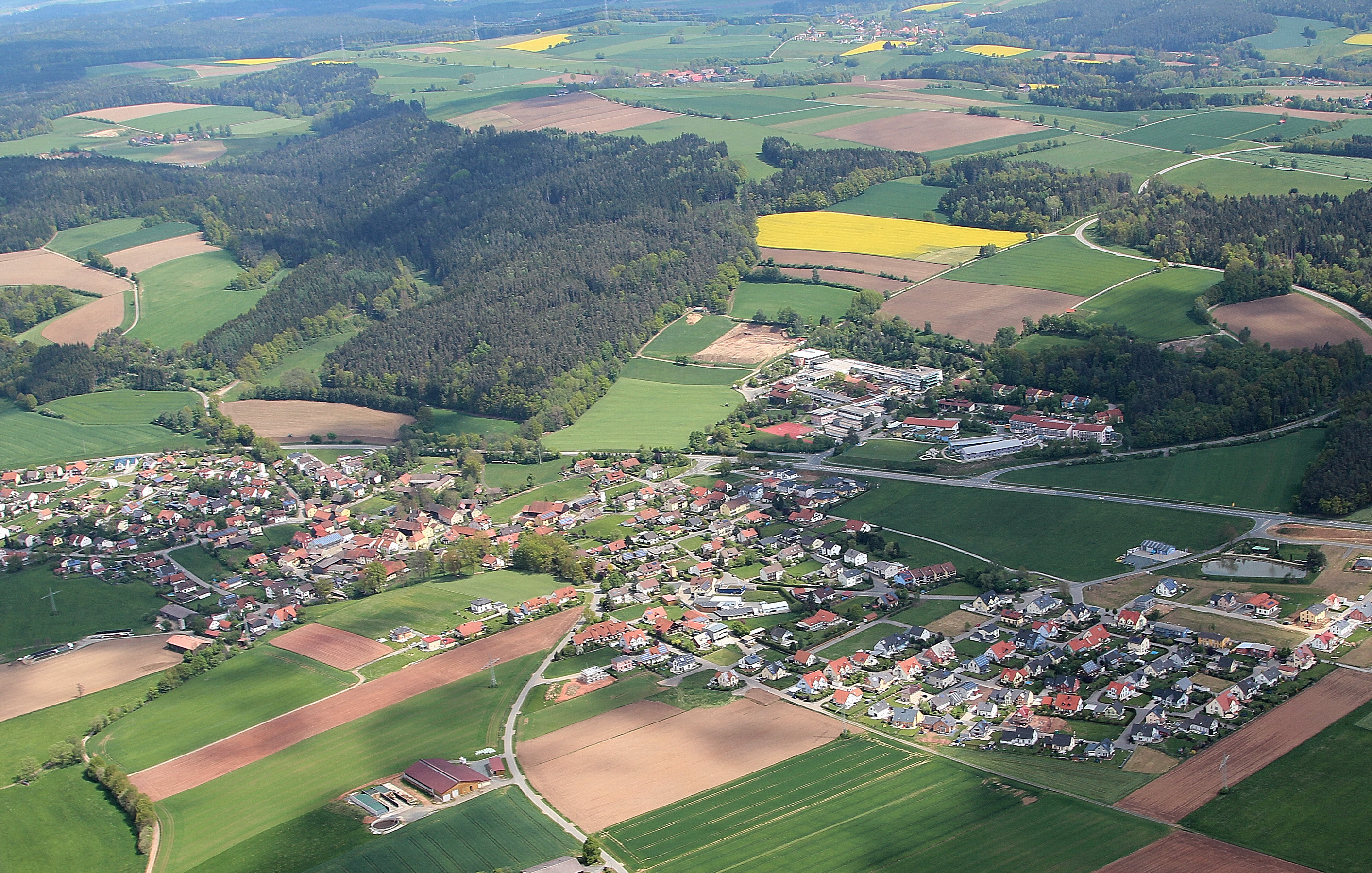 Irchenrieth, Landkreis Neustadt an der Waldnaab, Oberpfalz, Bayern